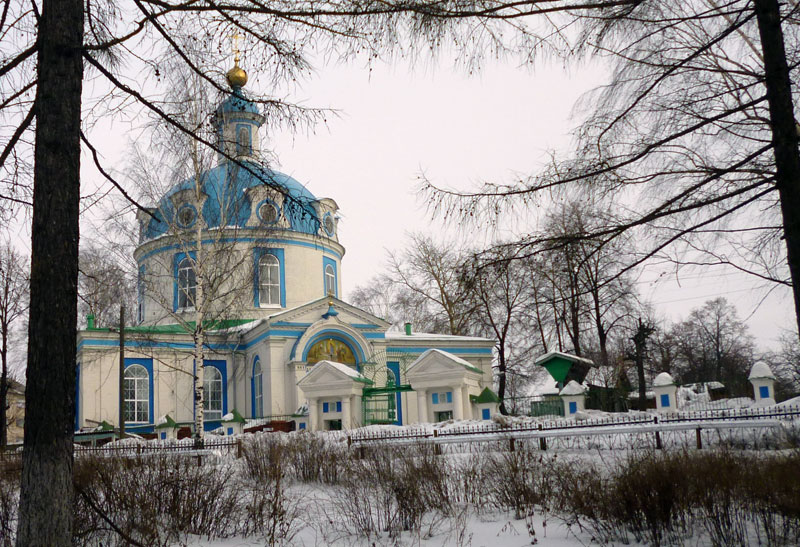 Успенский собор Яранска, кафедральный собор Яранской епархии